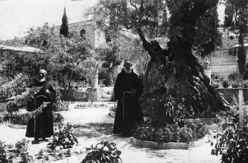 Garten Gethsermane, Jerusalem mit einem uralten Ölbaum